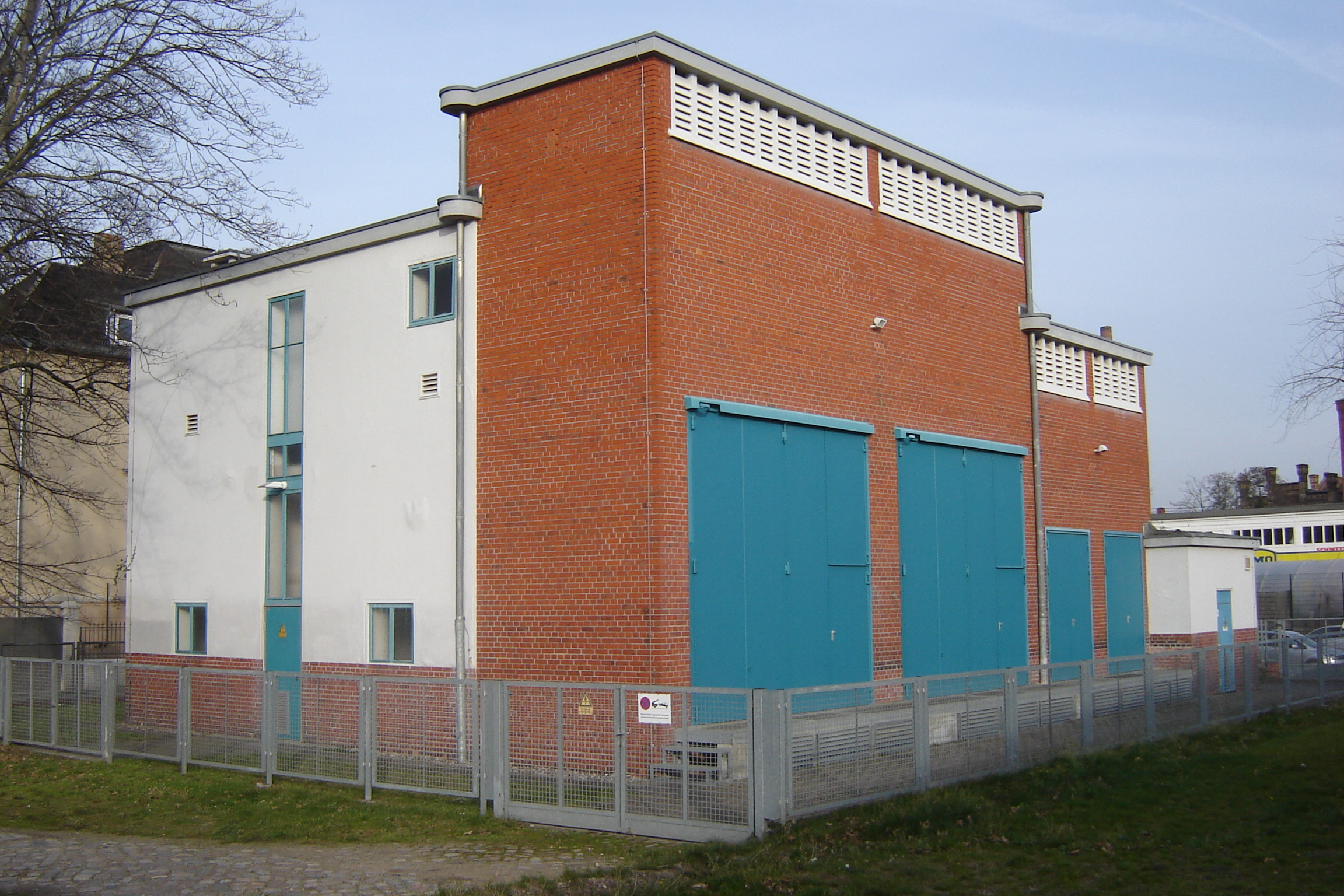 Magdeburg, Lübecker Straße, Transformatorenstation (Kulturdenkmal)